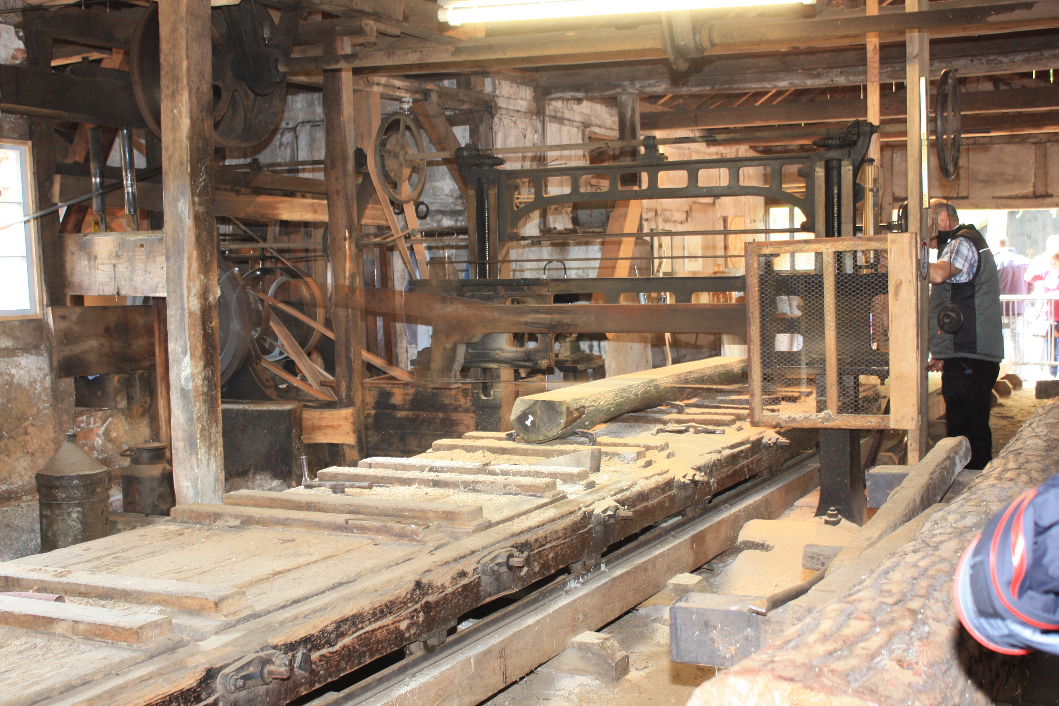 Sägegatter der Sägemühle Meier-Osthoff, Harsewinkel. Links im Bild der Exzenterantrieb in Aktion.